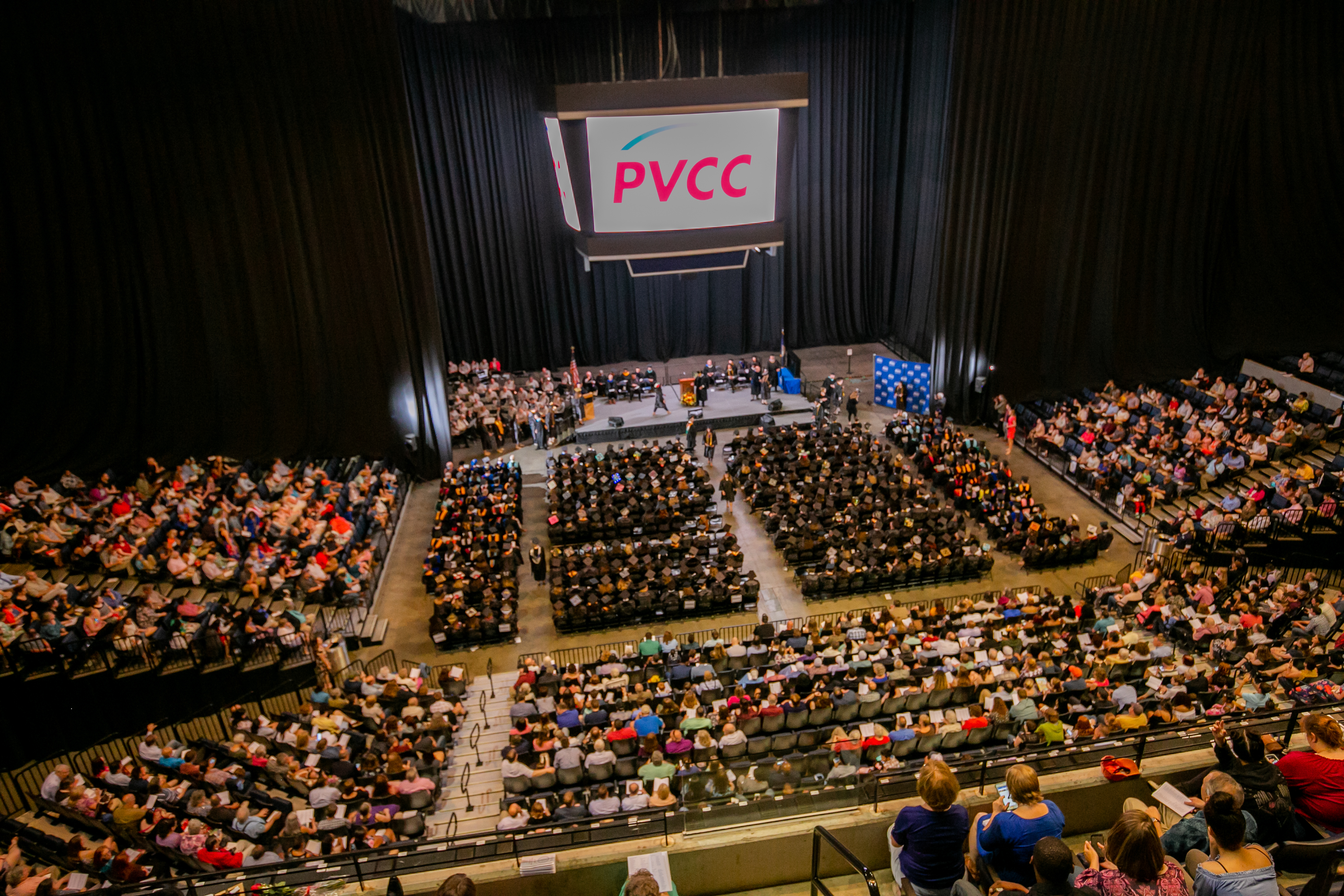 PVCC Commencement 2018 175